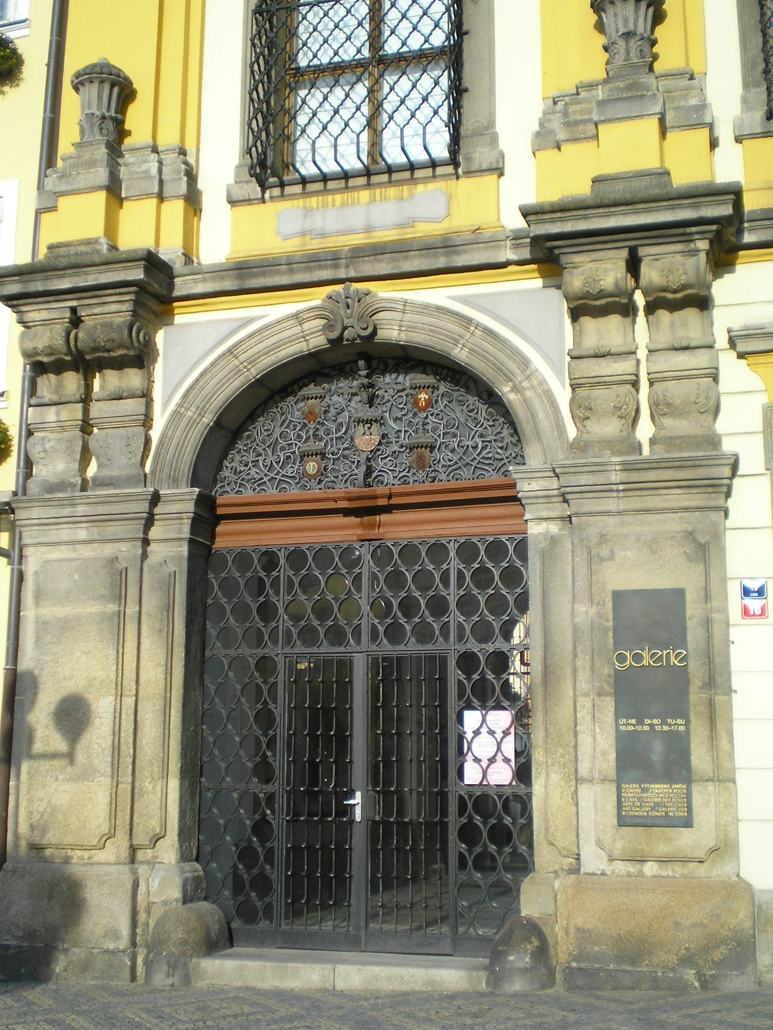 Radnice nová (Cheb), nám. Jiřího z Poděbrad 1, Cheb